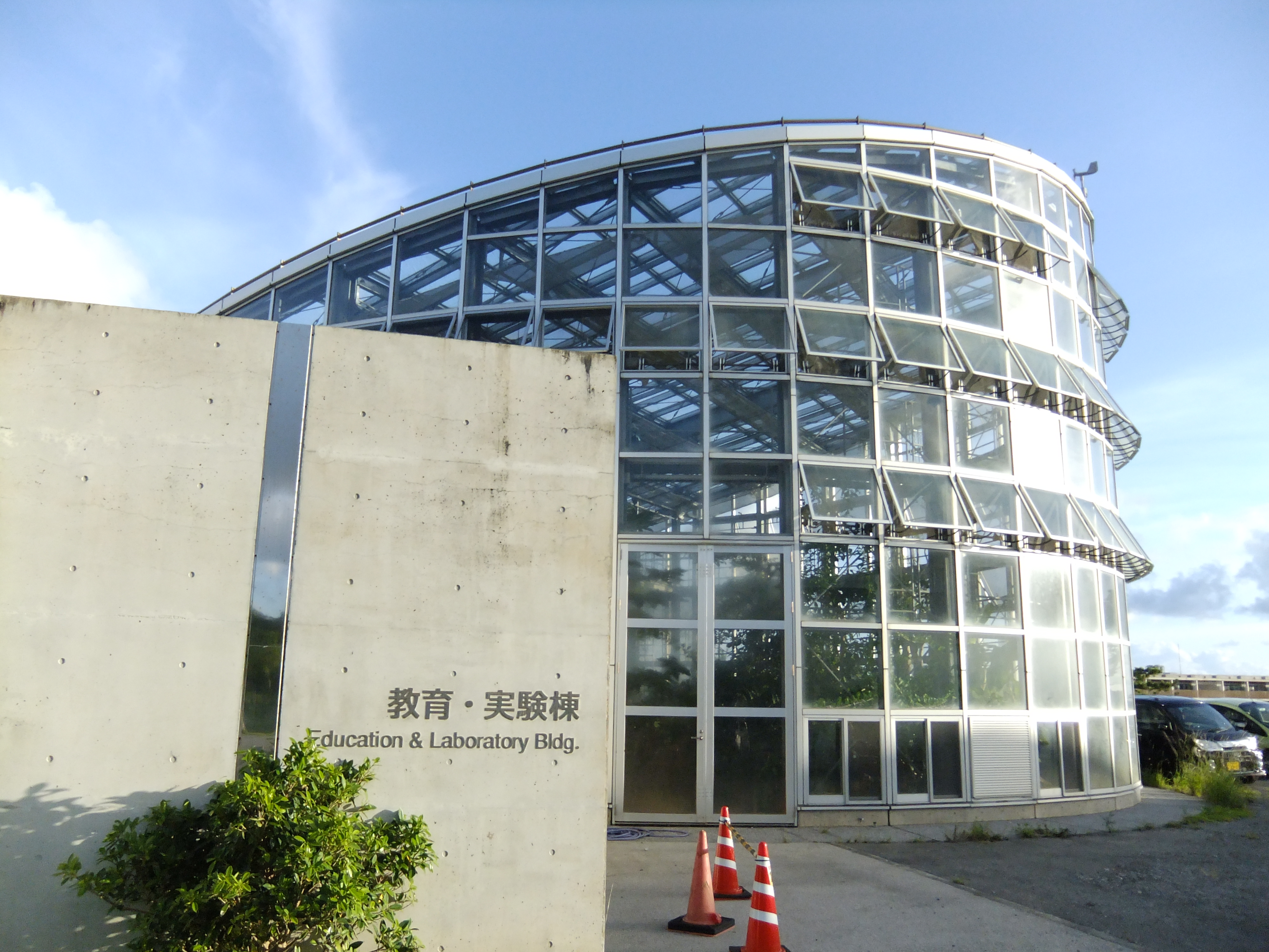 沖縄工業高等専門学校 教育実験棟